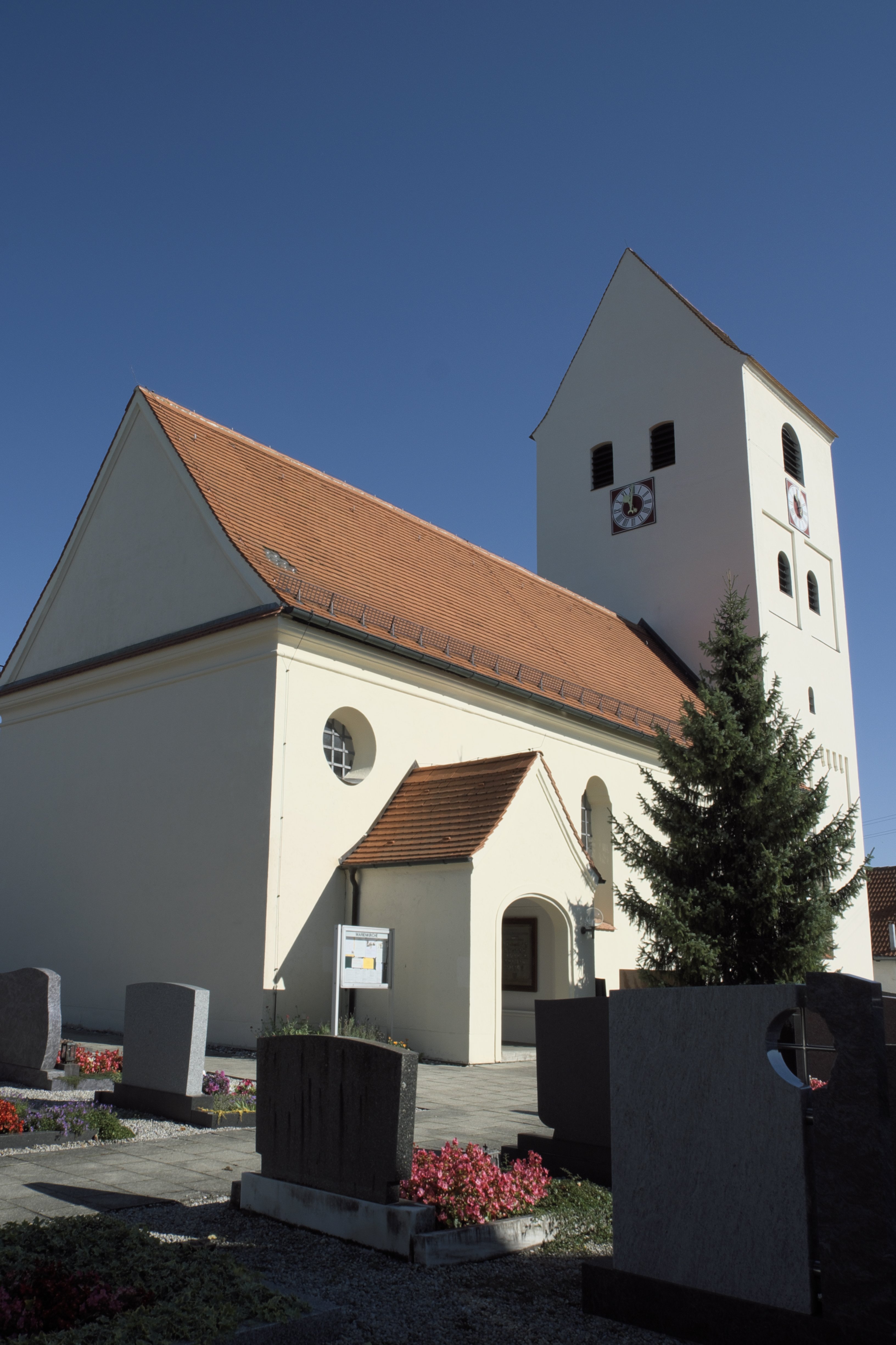 Katholische Filialkirche Mariä Himmelfahrt in Unterschweinbach (Egenhofen) im Landkreis Fürstenfeldbruck (Bayern/Deutschland)